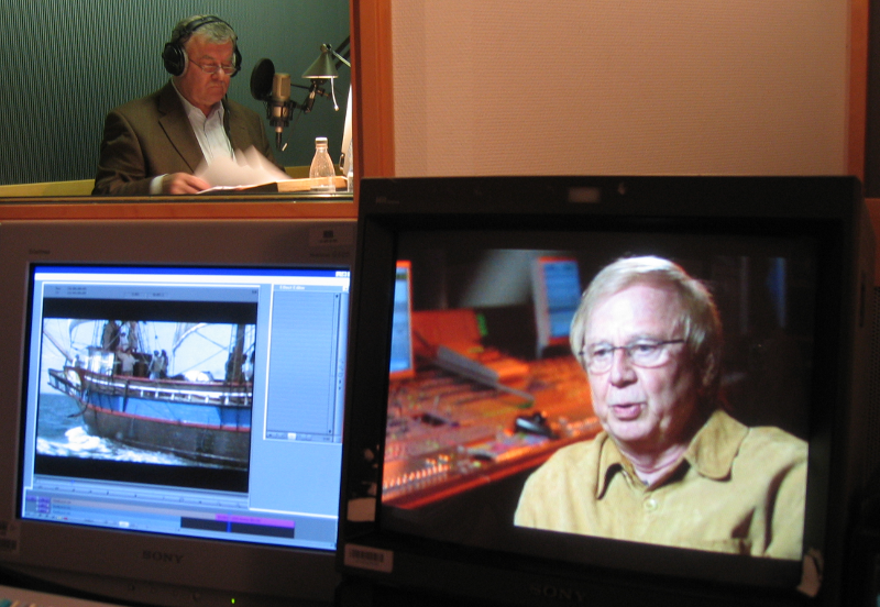 Joachim Kerzel bei der Vertonung der N24 Reportage "Rogue Waves" in einem ProSiebenSat.1 Produktion Berlin Schnittraum.